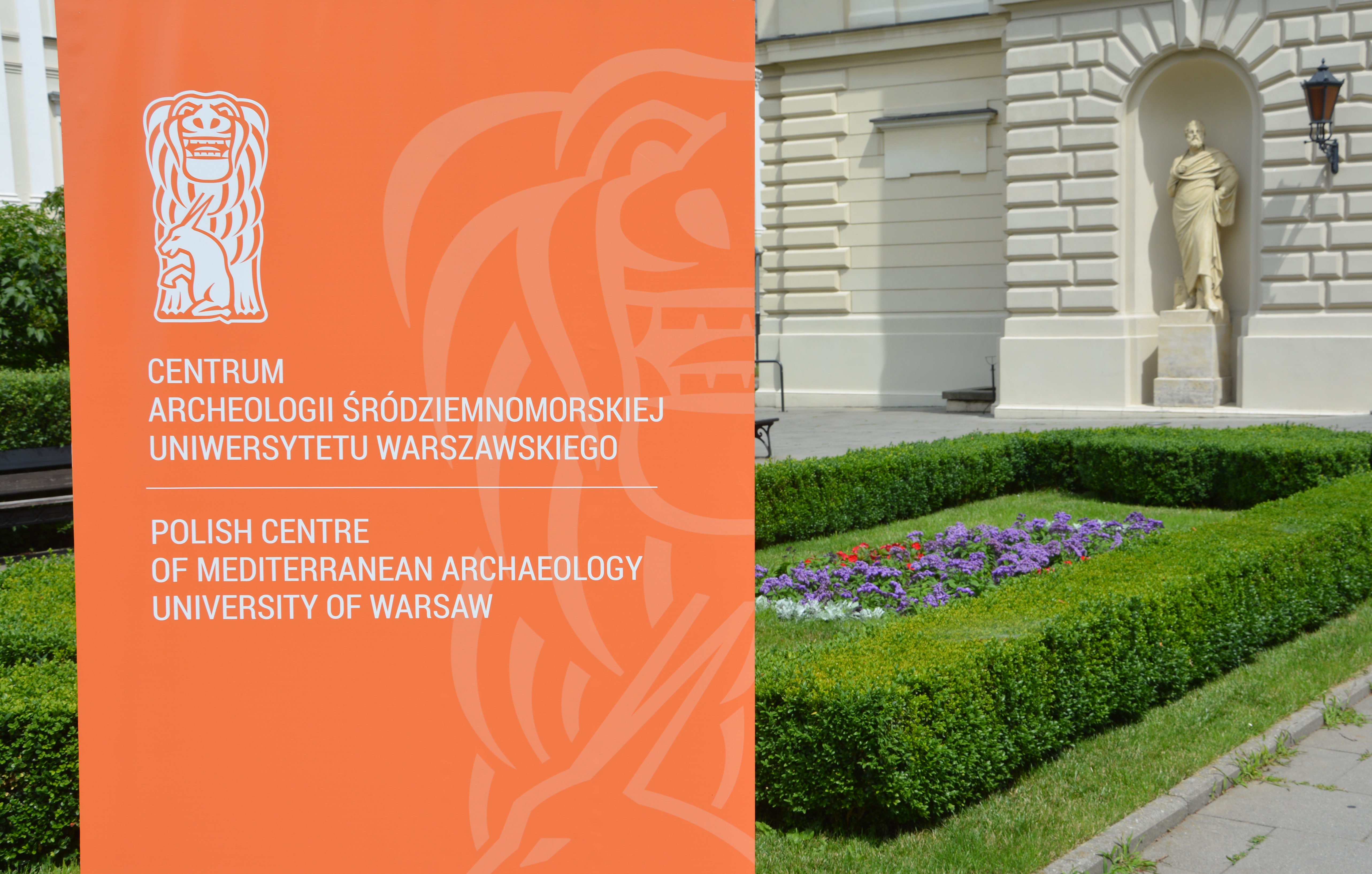 Ikona w logo Centrum Archeologii Śródziemnomorskiej UW to wizerunek reliefu lwa odkrytego przez misję CAŚ UW w Palmyrze. Nowe logo przyjęto w 2017 roku.